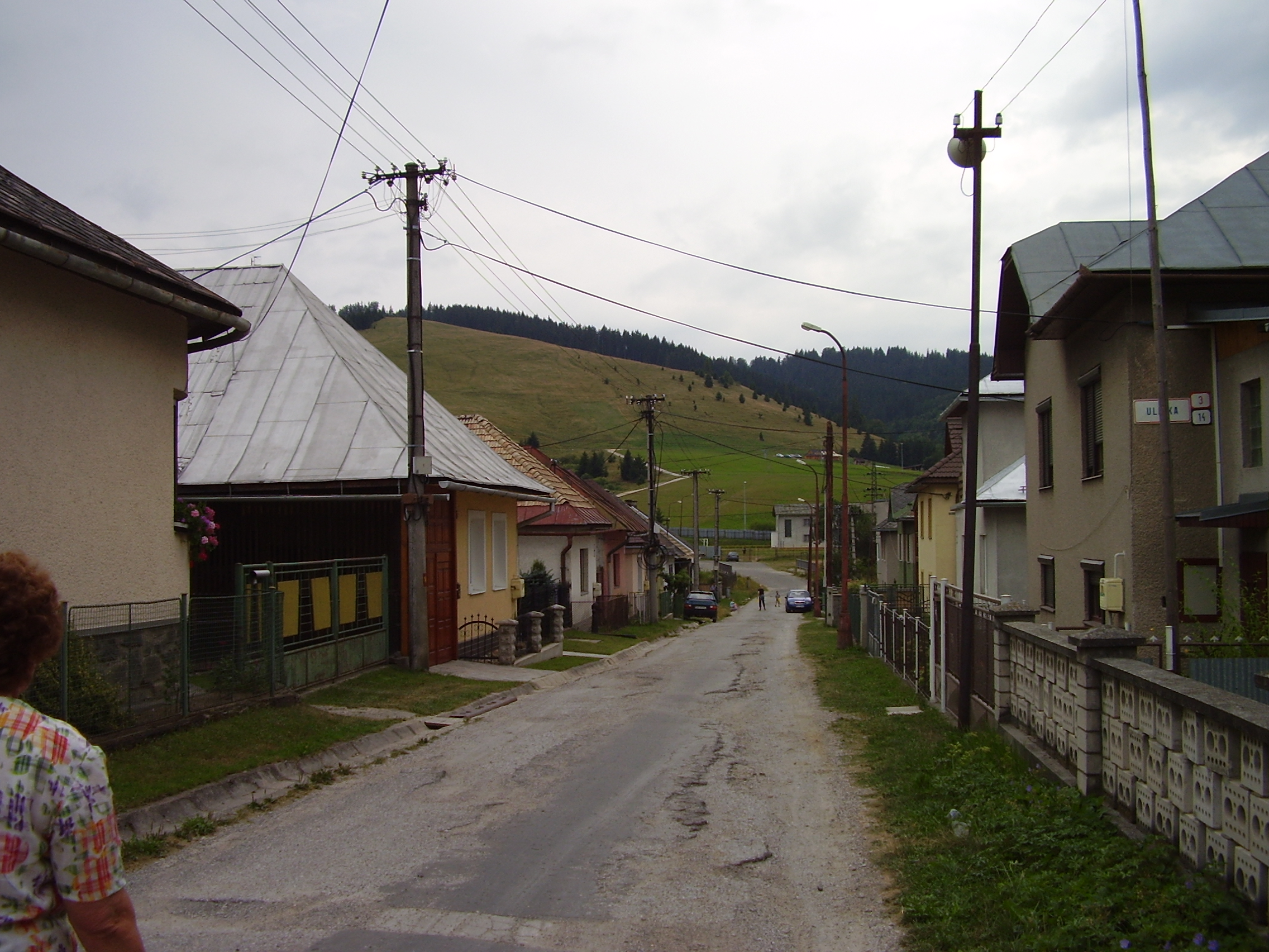 Michalová, okres Brezno, Slovakia